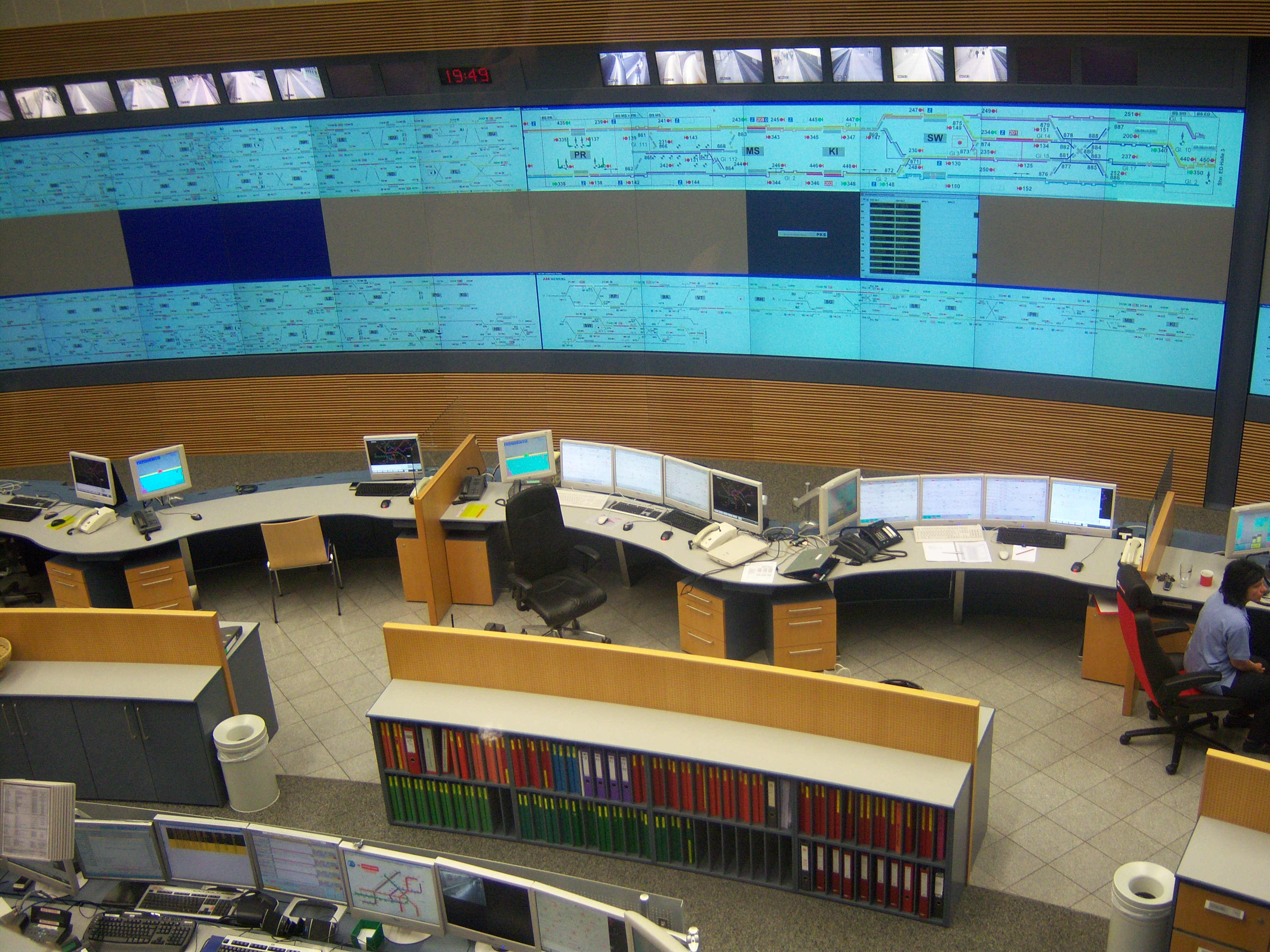 Leitstelle Erdberg der Wiener U-Bahn